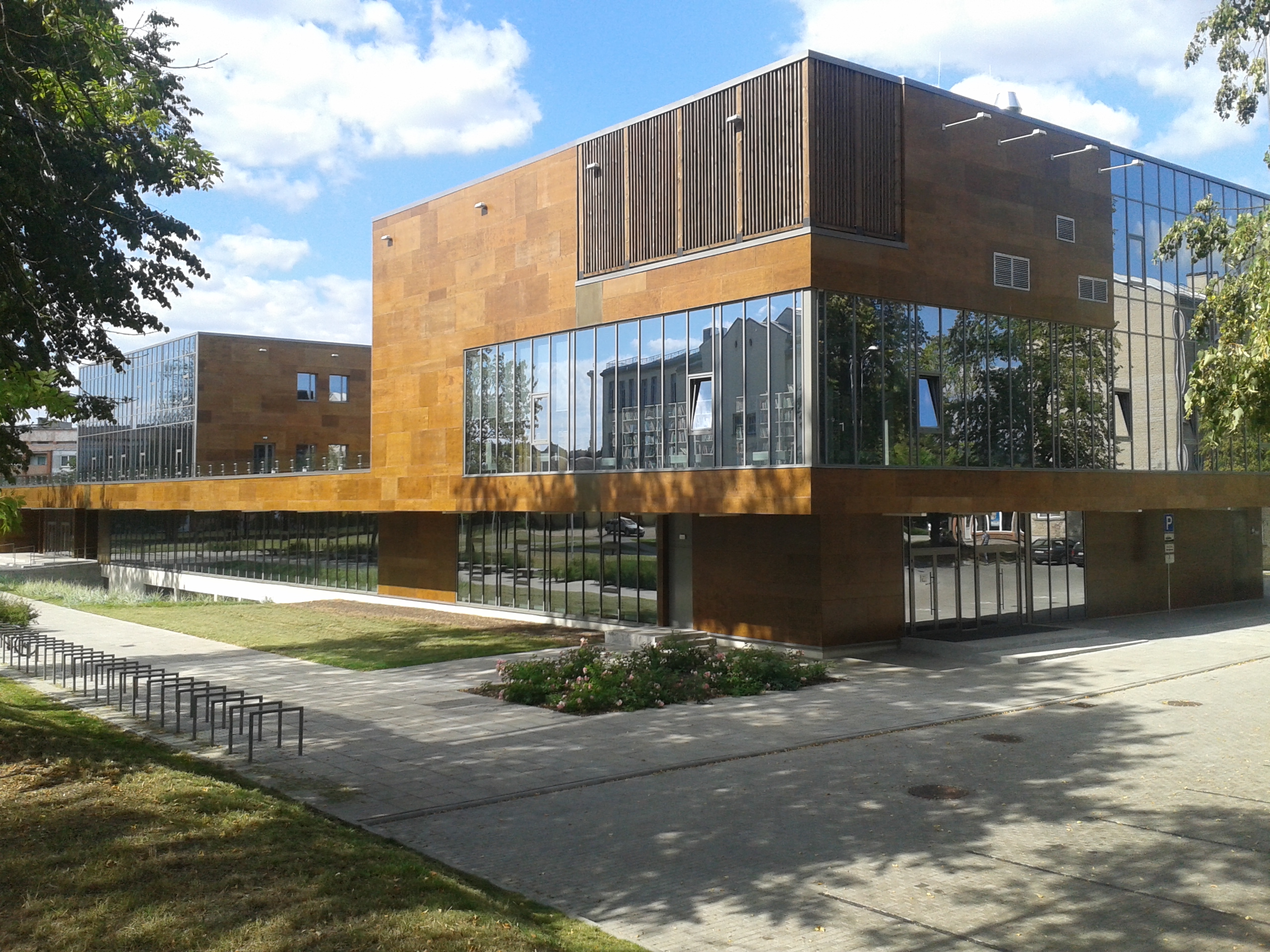 RA inženieru fakultāte. Rēzekne. 2015. g. augusts.